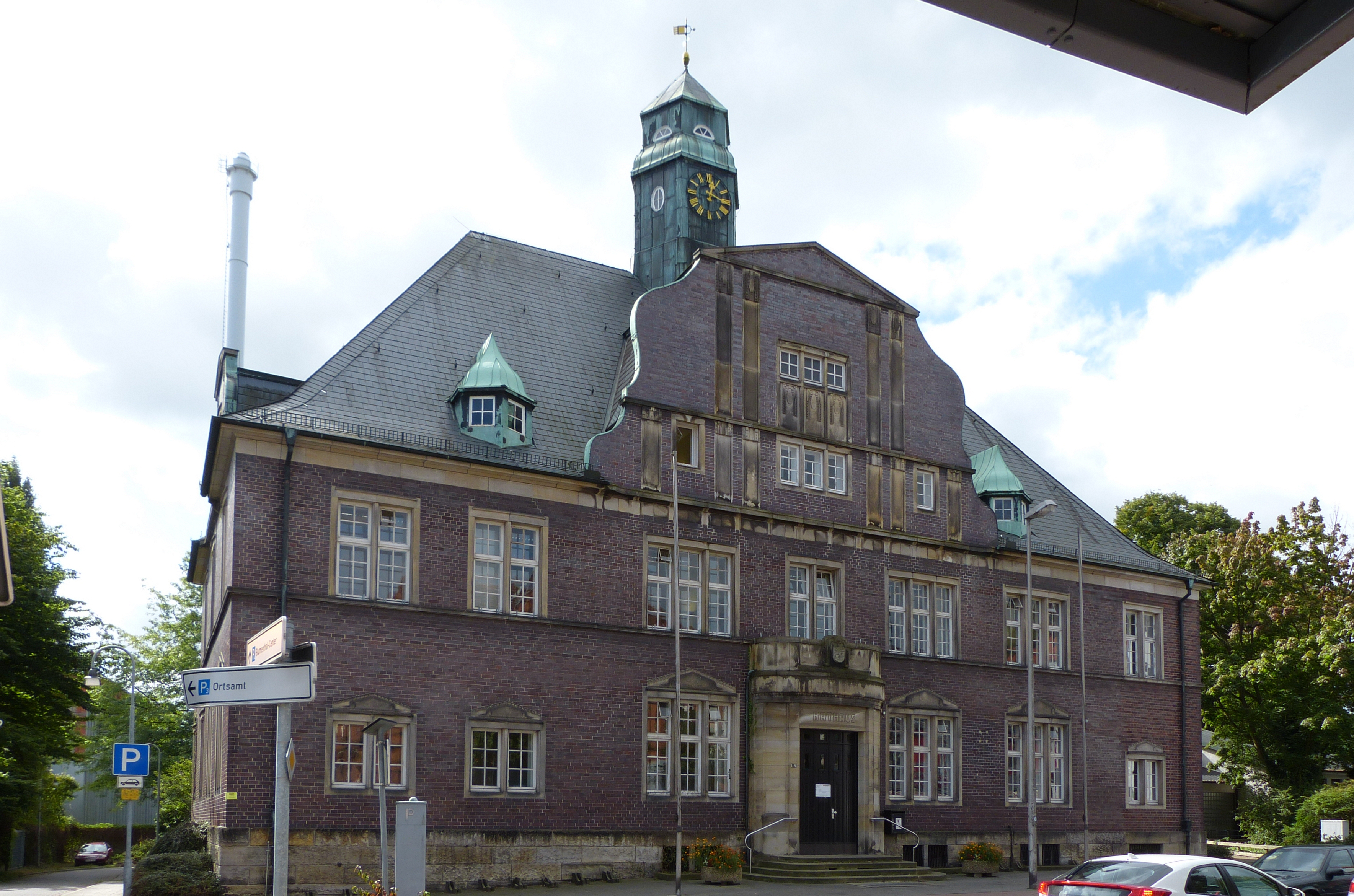 Rathaus Blumenthal in Bremen, Landrat-Christians-Straße 107Das abgebildete Objekt ist ein geschütztes Kulturdenkmal in der Freien Hansestadt Bremen, mit der Nr. 1293 beim Landesamt für Denkmalpflege registriert.